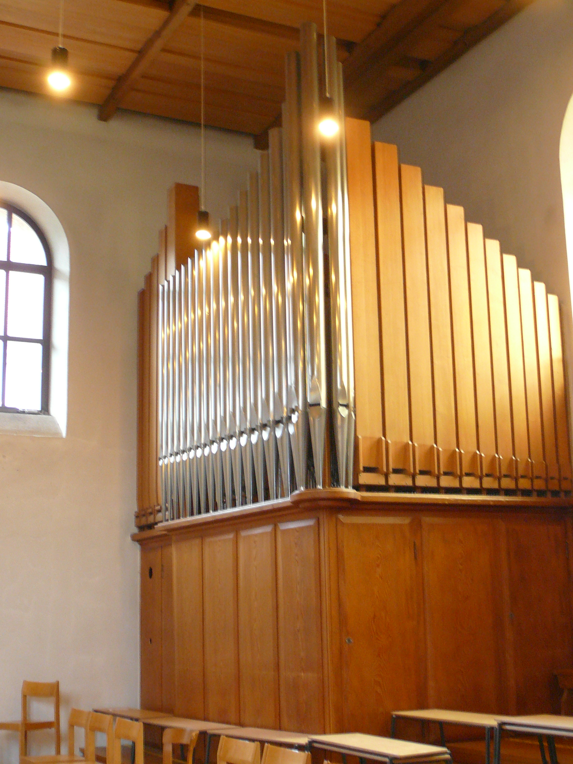 Römisch-katholische Kirche Herz Jesu Zürich-Wiedikon Orgel (Teilansicht)